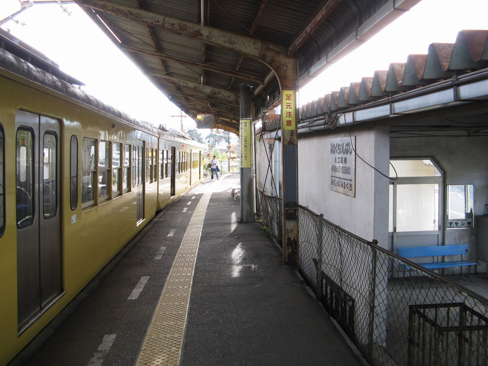 近江鉄道水口石橋駅 ホーム（貴生川方を望む）